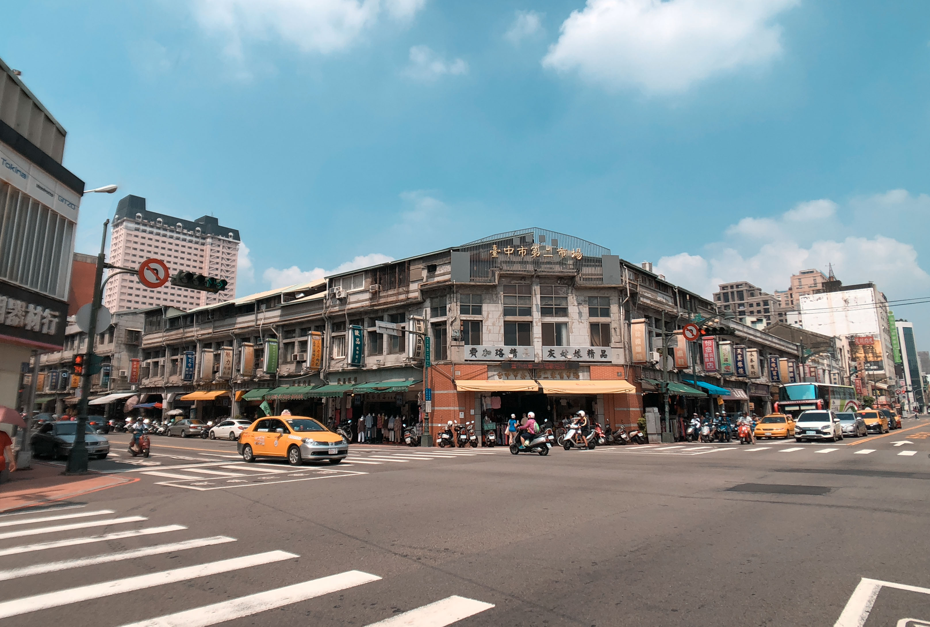 第二市場（全名為臺中市公有第二零售市場）為臺中一座百年市場，建於日治時期，從1917年開幕至今超過百年。 這座百年市場出了不少有名的美食，像是有名的李海滷肉飯、王記菜頭粿，老賴紅茶也是從這裡發跡的。